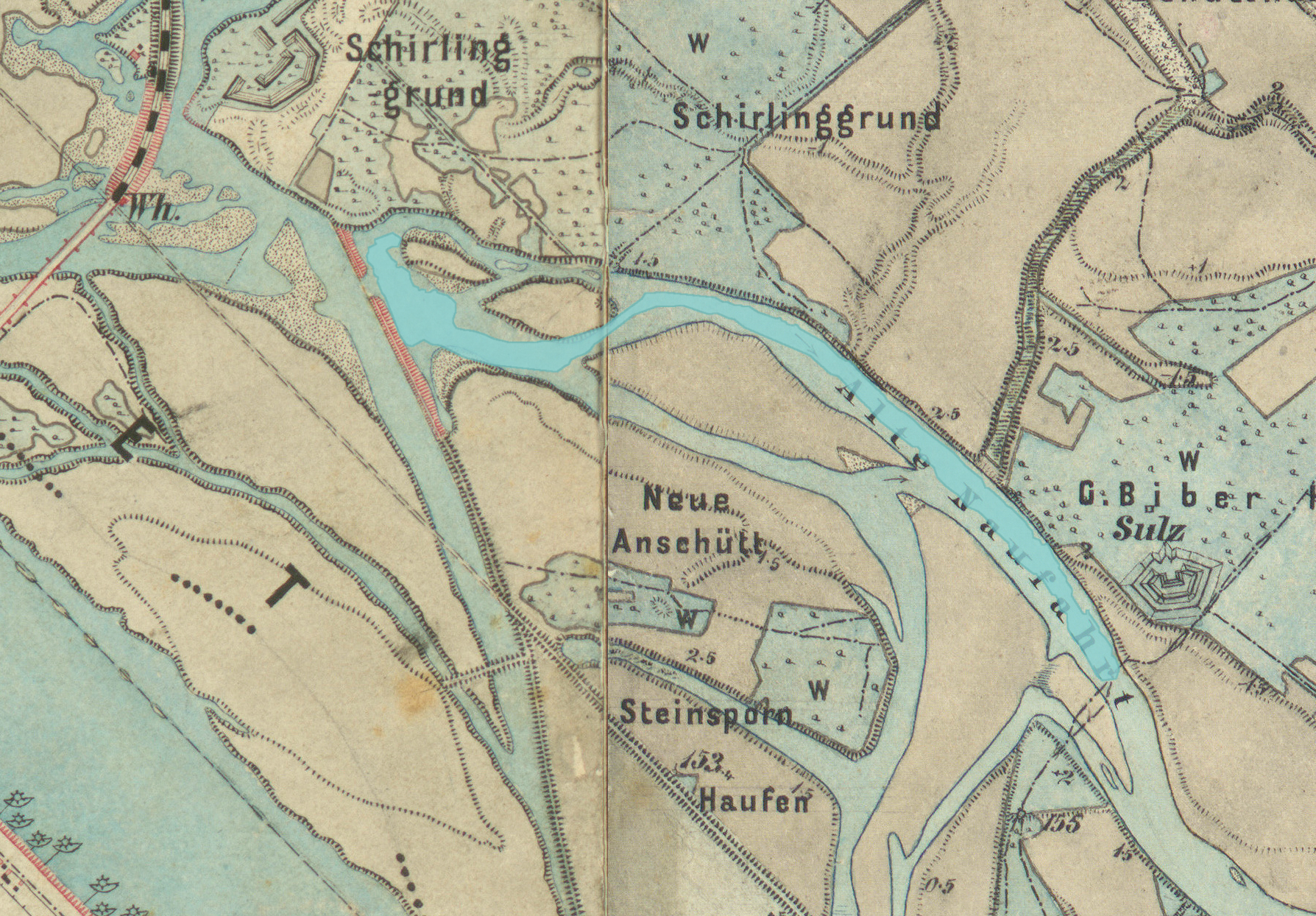 Schillerwasser in Wien-Donaustadt auf der Landesaufnahme von 1873